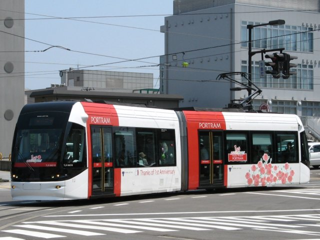 2007年5月3日午前11時10分(JST)頃、投稿者が牛島町交差点の南西側歩道上で撮影しました。2007年4月29日から5月20日までは、開業1周年を記念して、各車体の前面窓下と乗車用ドア隣にステッカーが貼られており、更にTLR0601（赤）とTLR0607（紫）については、メッセージ「Thanks of 1st Anniversary」と花のステッカーも貼られた特別仕様になっており、開業1周年記念の臨時列車「ドリームポートラム」に使用されていました